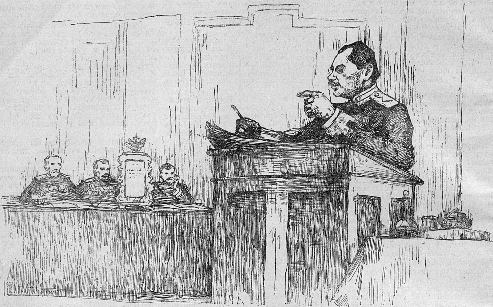 Дело о сдаче Порт-Артура. Заседание военного суда 22 января 1908 года. Обвинительная речь военного прокурора.